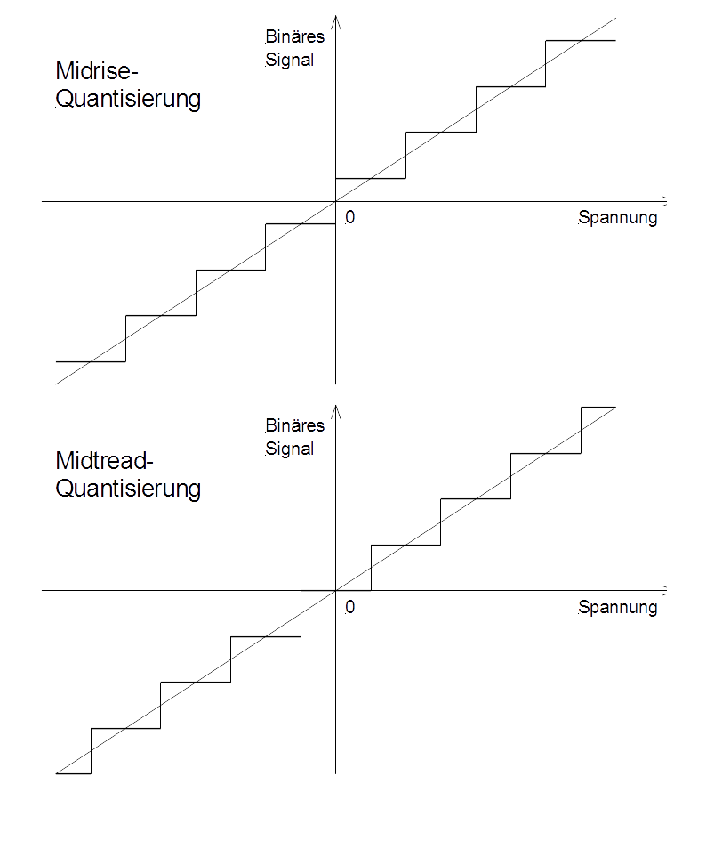 Quantisierungskennlinien 'midrise' und 'midtreat'